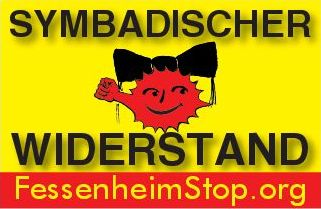 Logo des „Aktionsbündnis Fessenheim stilllegen. Jetzt!“ unter Verwendung der Markgräfler „Hörnerkappe“ (Bestandteil einer regionalen traditionellen Tracht)